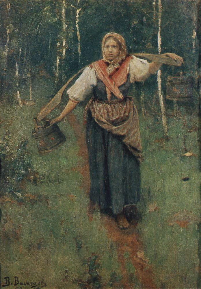 За водой